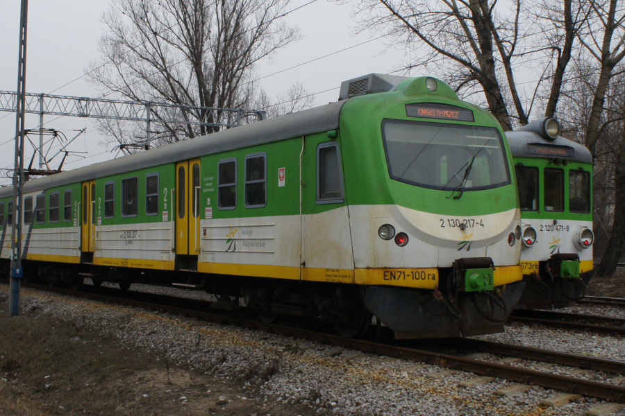 Elektryczny zespół trakcyjny EN71-100 stoi na torach odstawczych nieopodal stacji Warszawa Wileńska.